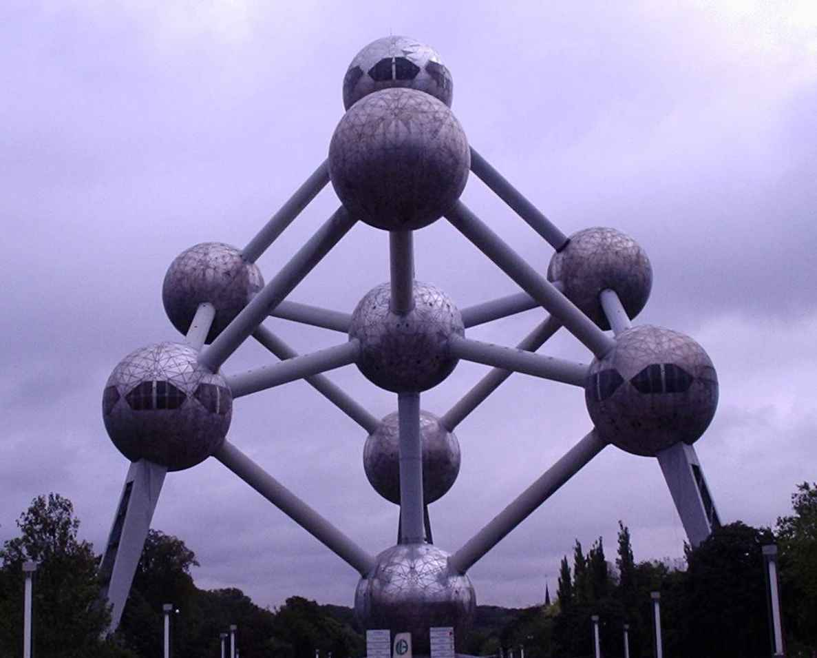 Атоміум. Споруда в Брюсселі